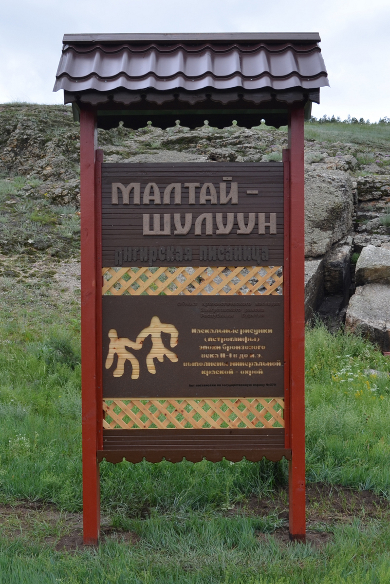 Археологический памятник расположен в пределах долины реки Курба находящиися в предгорьях хребта Улан-Бургасы: Ангирская писаница «Малтай-Шулуун» - петроглифы бронзового века